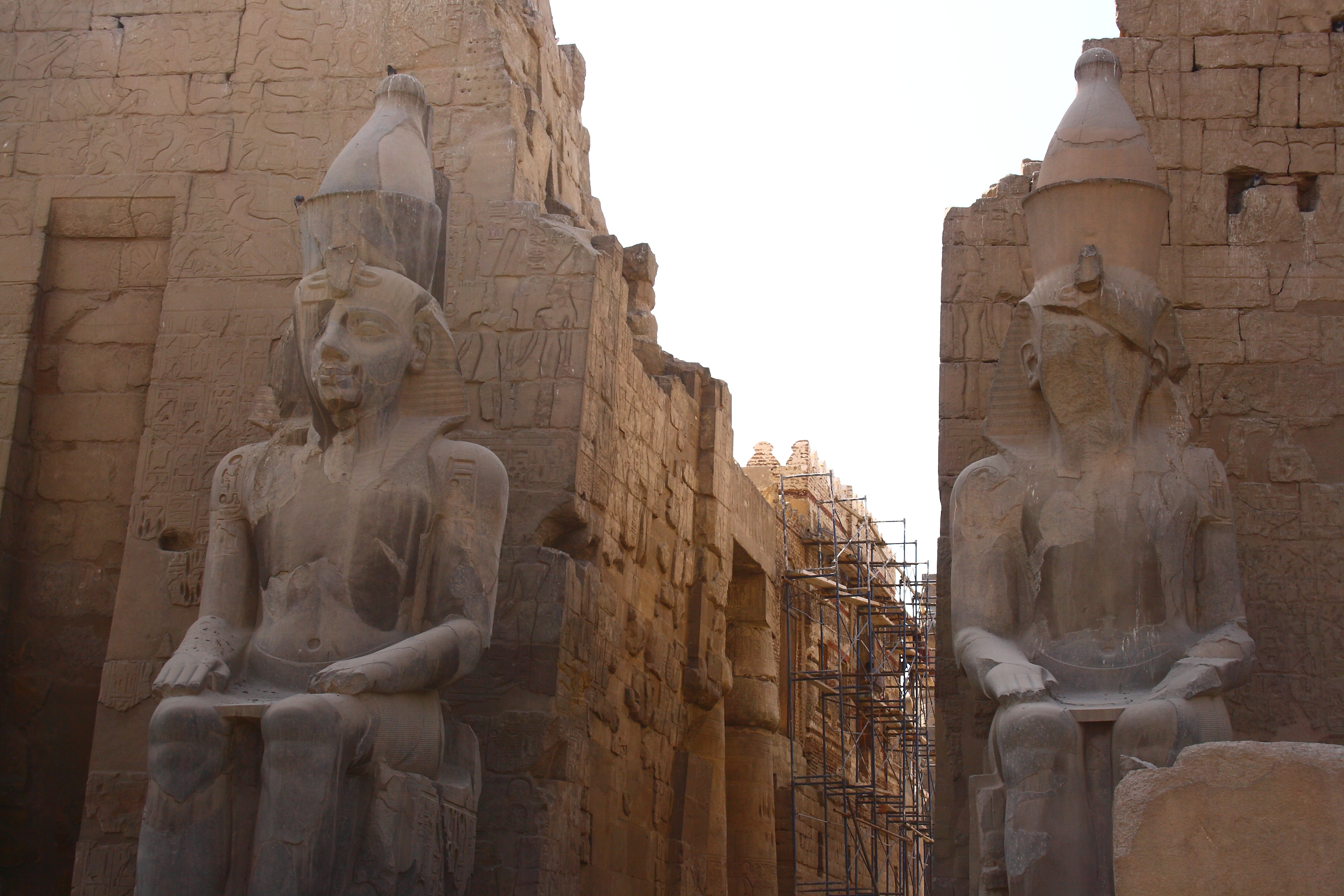 Luxor Tempel